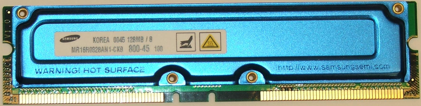 128Mo Rambus RDRAM